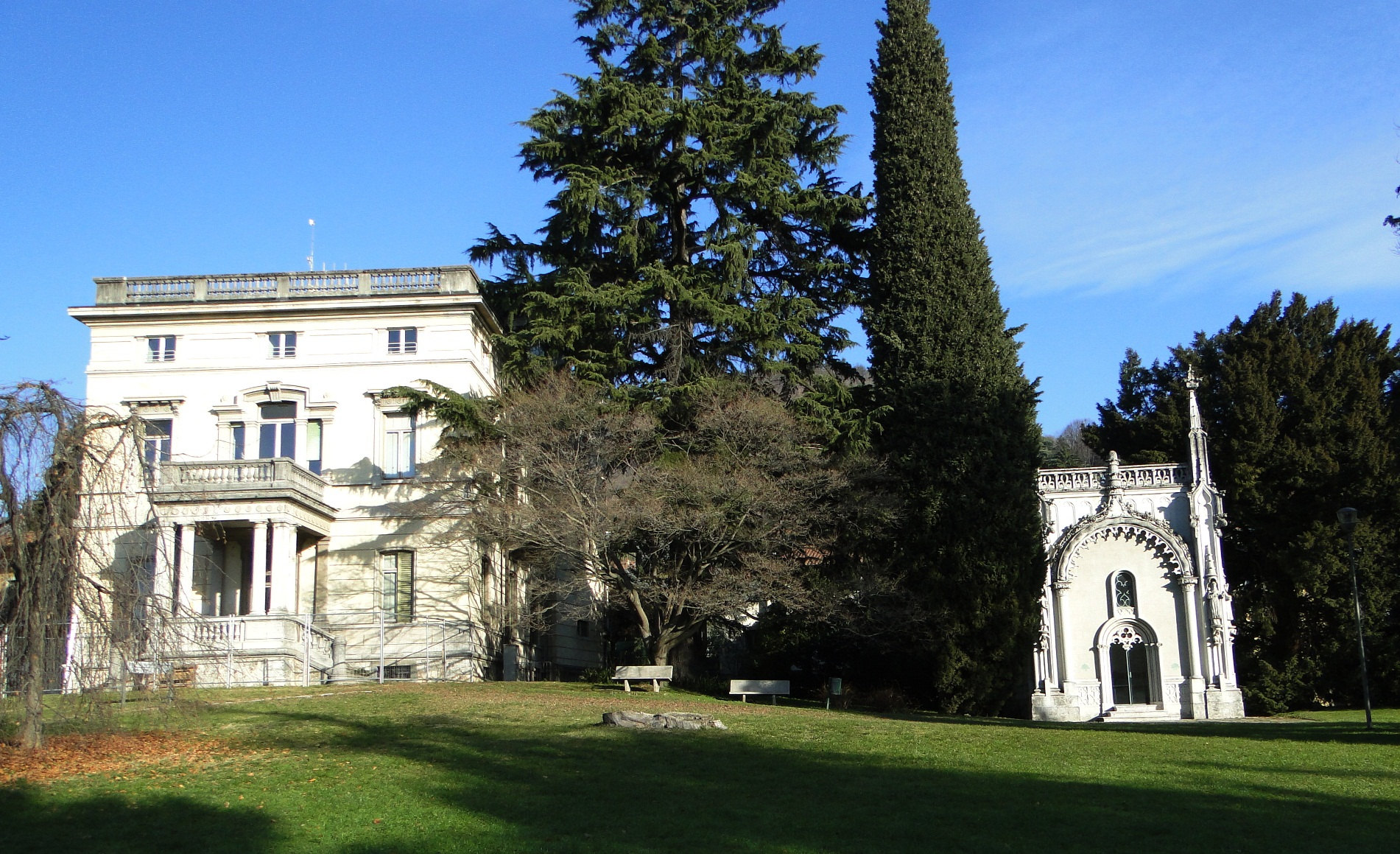 Parco Montecchio e villa Pesenti, Alzano Lombardo (BG), Italy